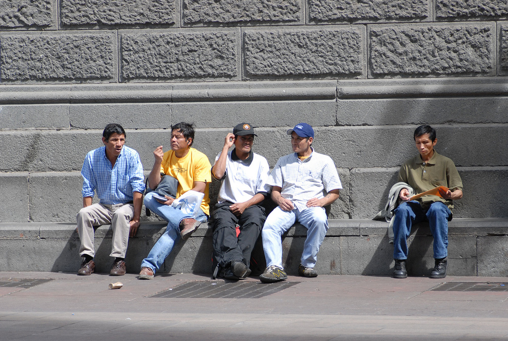 Estudian los efectos de la migración peruana en Santiago. La investigación del Instituto de Estudios Urbanos y Territoriales de la UC se basó en técnicas como entrevistas en profundidad, historias de vida y observación etnográfica.